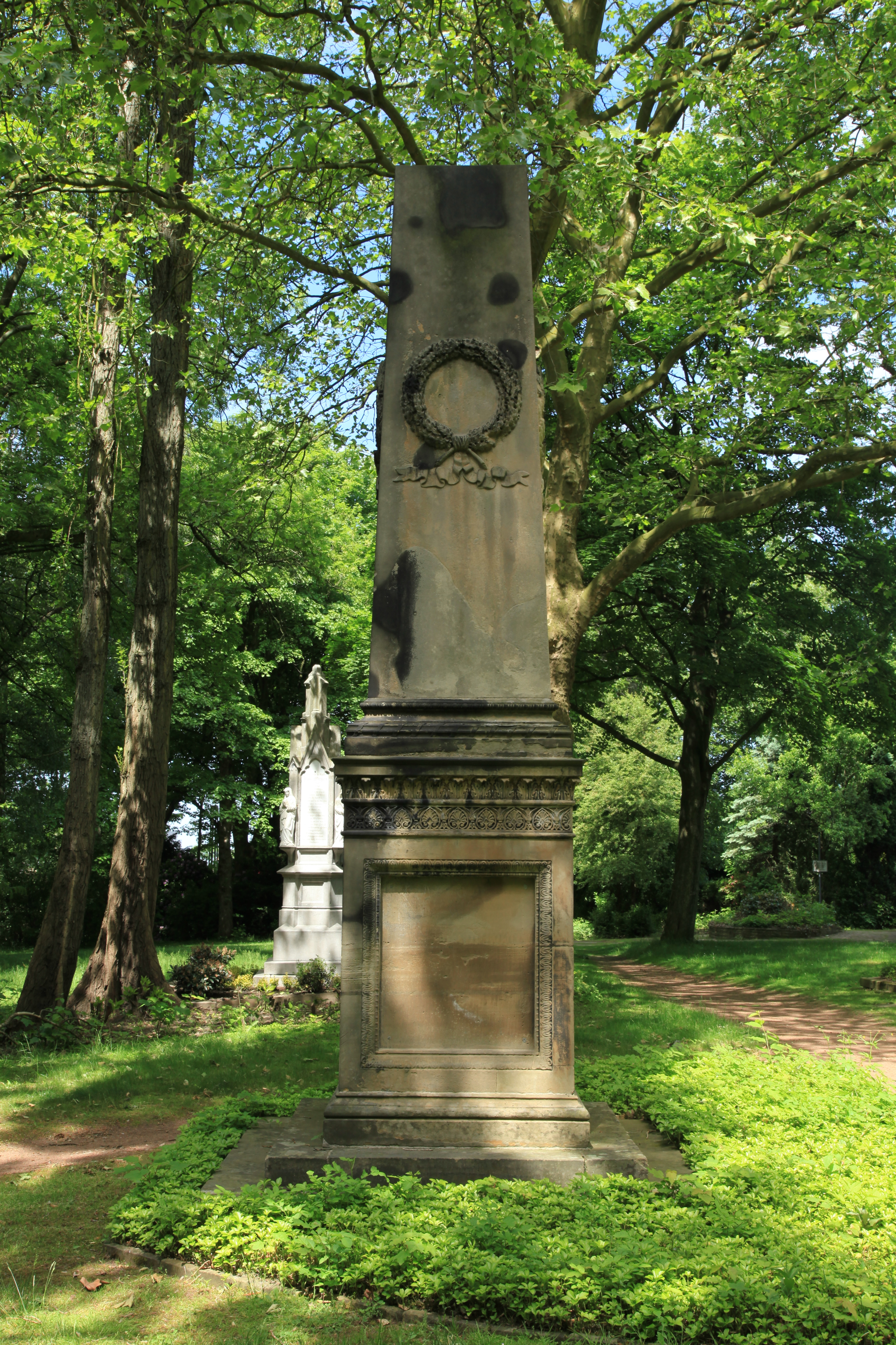 Grabmal Maximilian Greve, Kortumpark, Wittener Straße in Bochum